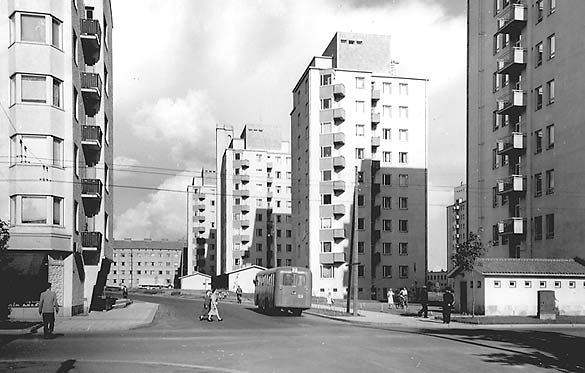 Linja-auto Kalevan tornien keskellä 1950-luvun loppupuolella